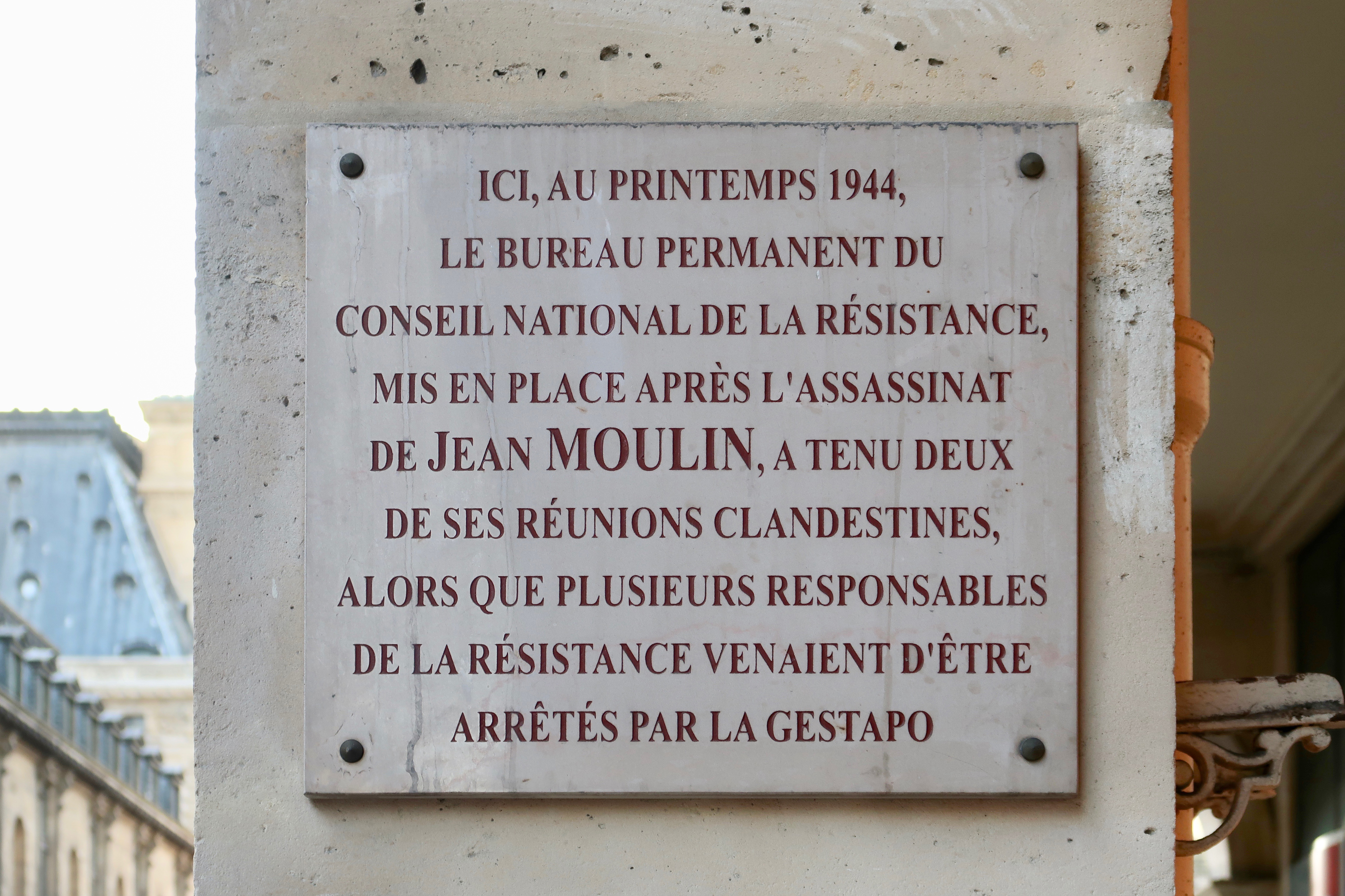 Plaque commémorant deux réunions clandestines du Conseil national de la Résistance du printemps 1944, après l'assassinat de Jean Moulin.